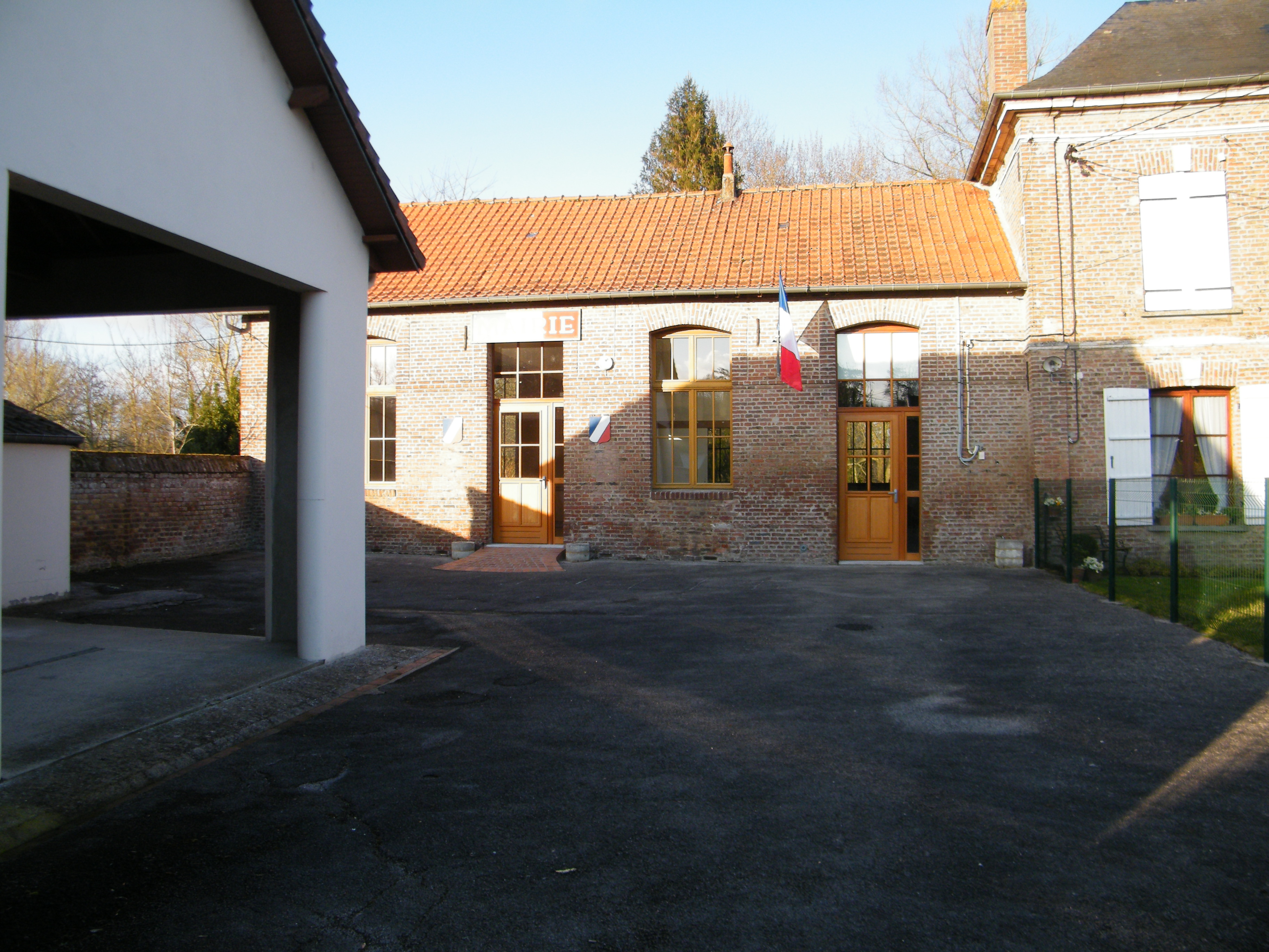 mairie